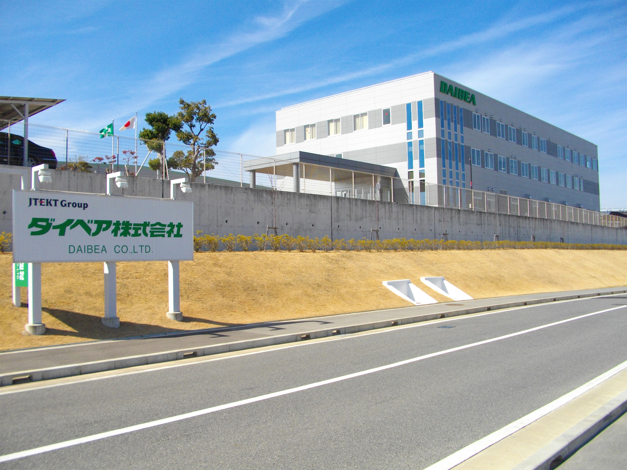 投稿者自身が『ダイベア株式会社 本社』 （大阪府和泉市あゆみ野二丁目8番1号）を撮影。